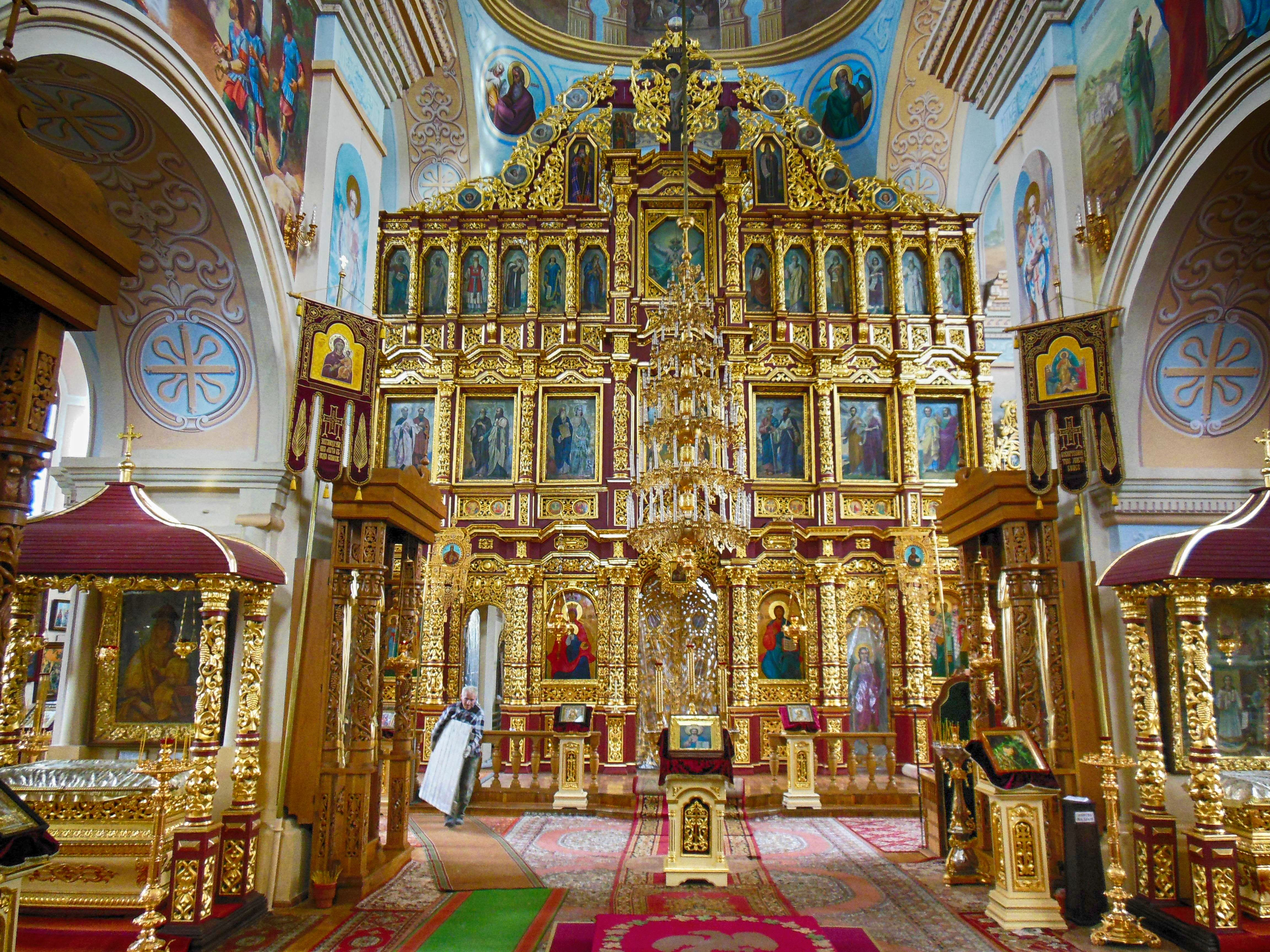 Беларуская (тарашкевіца): Комплекс Мікольскага манастыра ў межах агароджы:званіцажылы дом (шпіталь) Мікольская царквадэкаратыўнае аздабленьне царквы: фрэскі сюжэтныя, фрэскі арнаментальныя, іканастас, арнаментальная ляпнінаАнуфрыеўская царкваагароджа з уязной брамай. г. Магілёў This is a photo of Belarusian heritage monument. Reference number: 511Г000017 ( WLM)